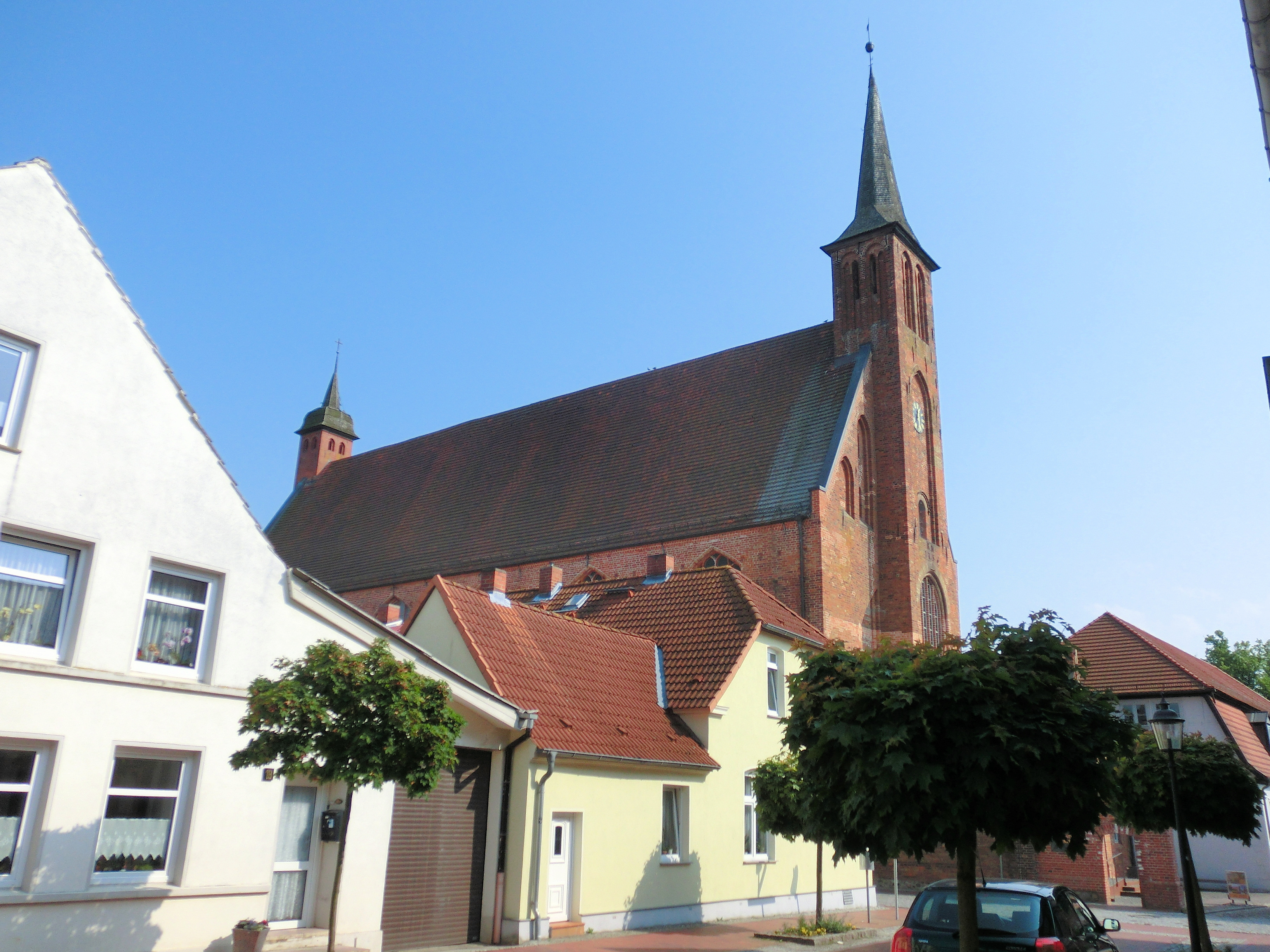 Kloster Ribnitz, Klosterkirche von Norden